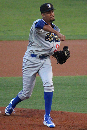 Dennis Santana